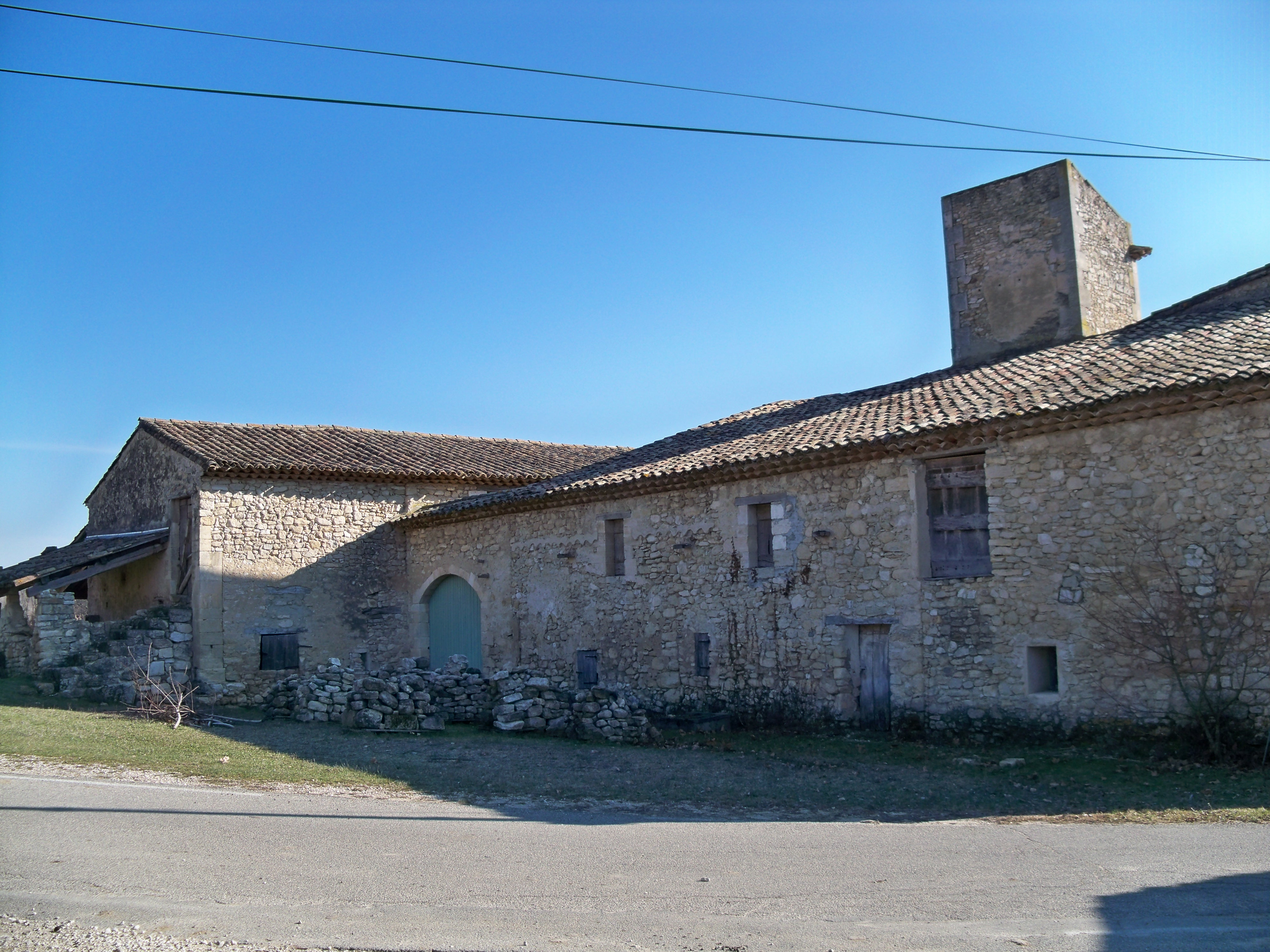 habitat à Paraire, hameau du Castellet (84), France